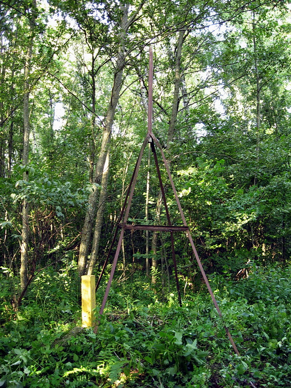 Дэбесі. Дуга Струвэ. Пункт «Дэйбісі»